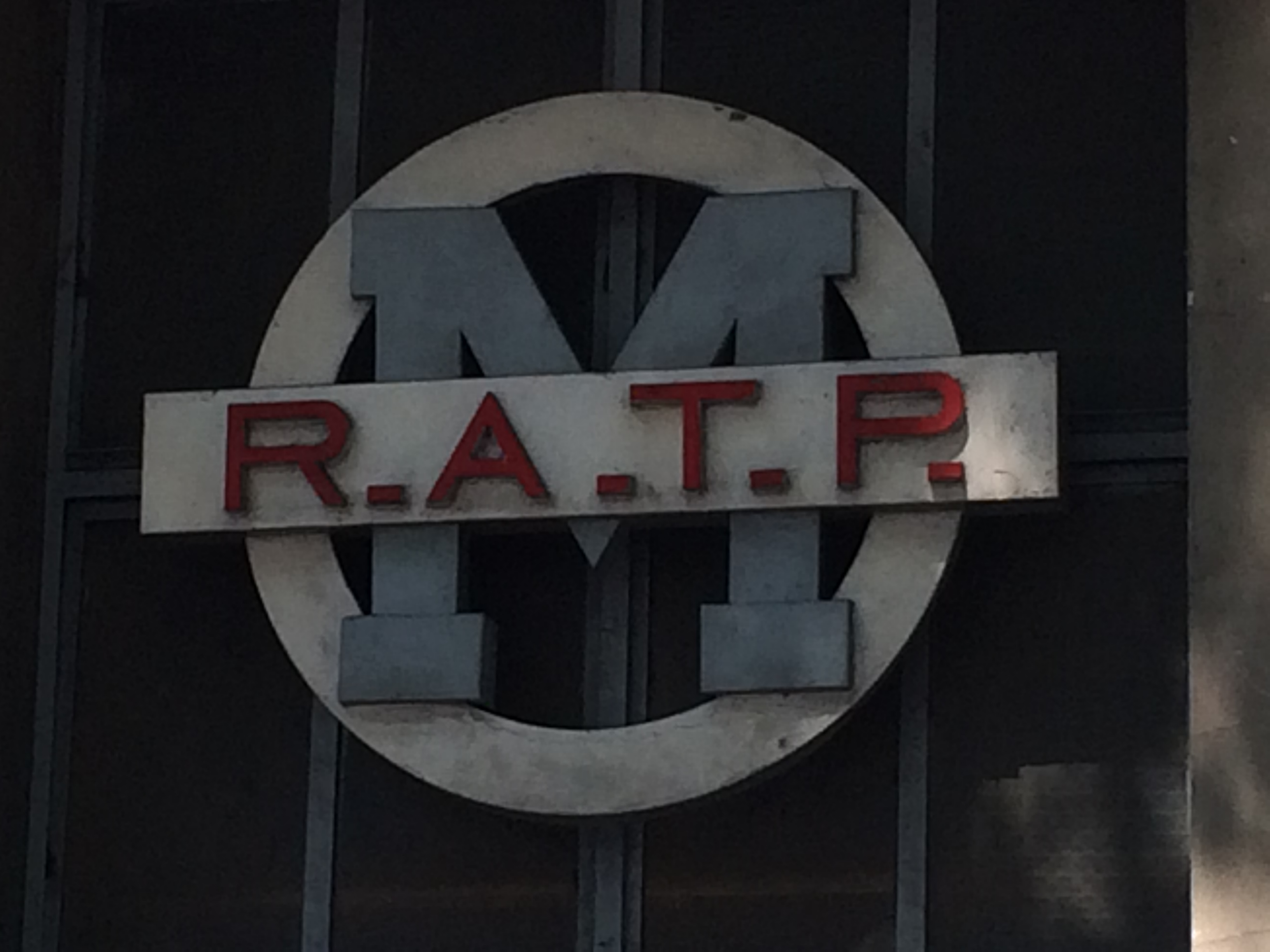 Aux abords de la station,de métro Carrefour Pleyel (au 198 boulevard Anatole France), un poste de redressement électrique de la RATP arbore un ancien logo.